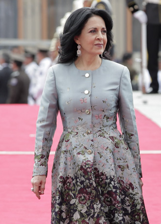 Tema: Transmisión del Mando Presidencial Ecuador 2017. Fotografía: Alberto Romo/Asamblea Nacional